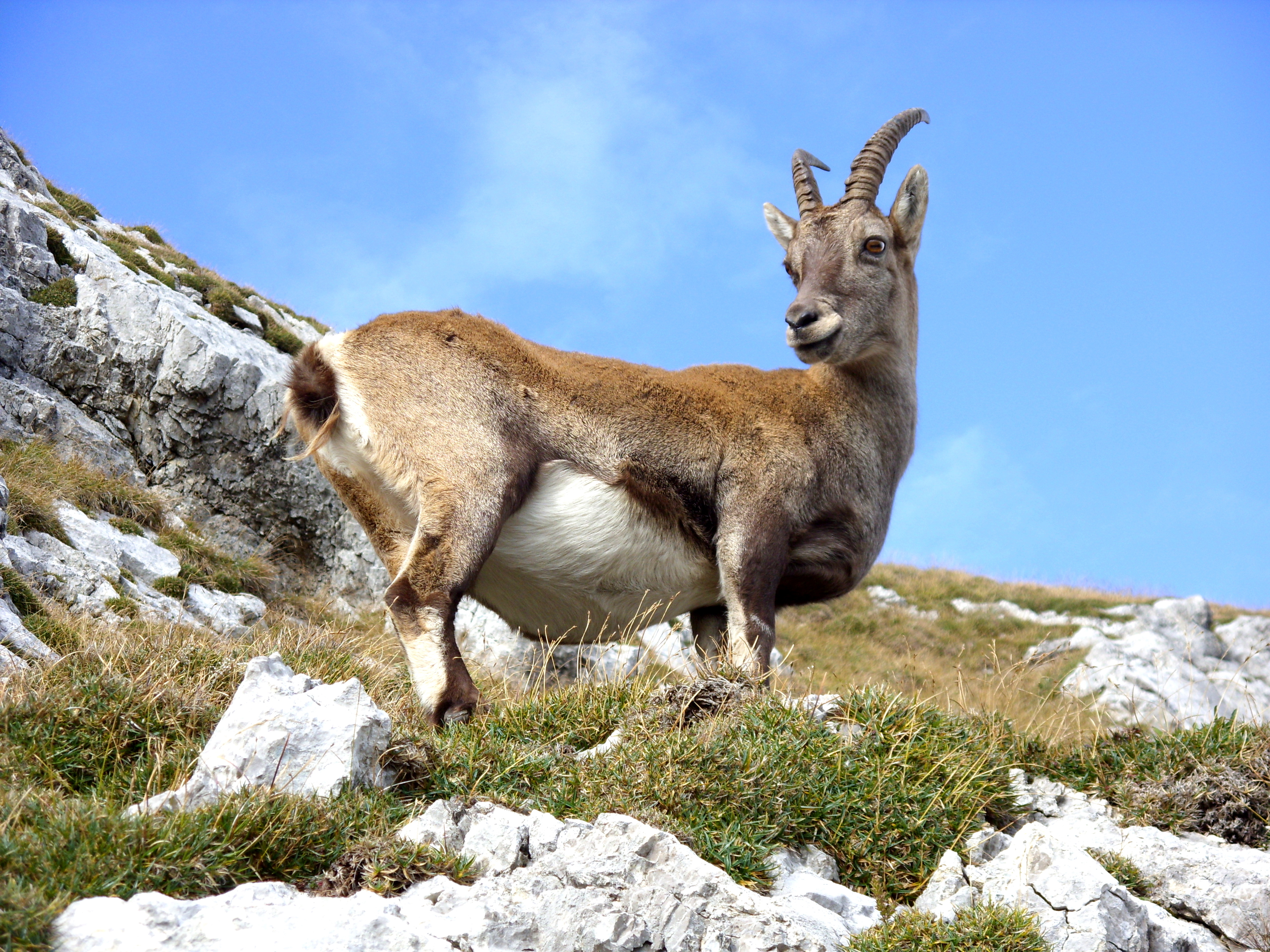 Alpensteinbock am Pilatus vom 07.10.2008